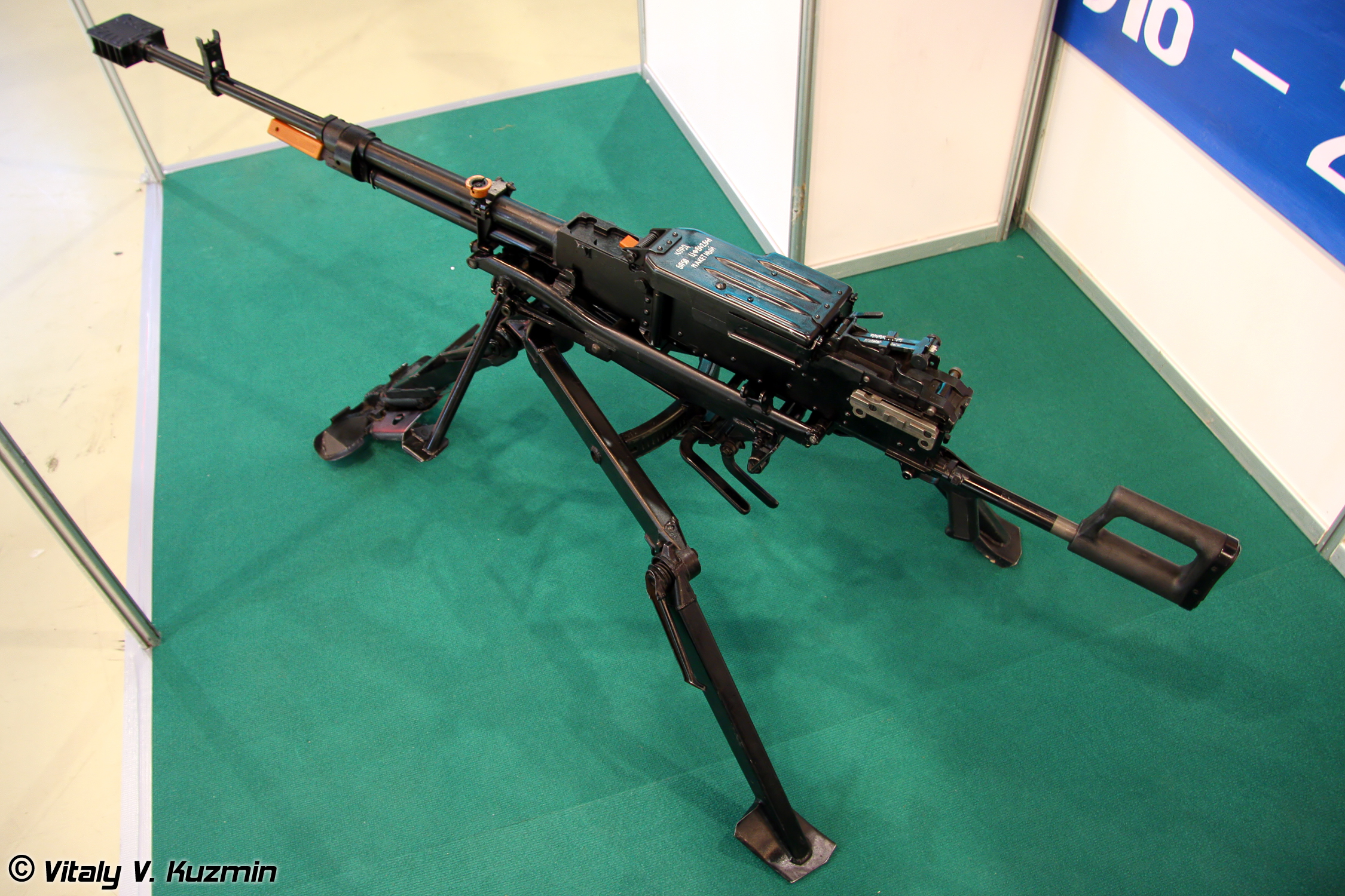 Корд на пехотном станке (Kord on infantry machinegun mount)